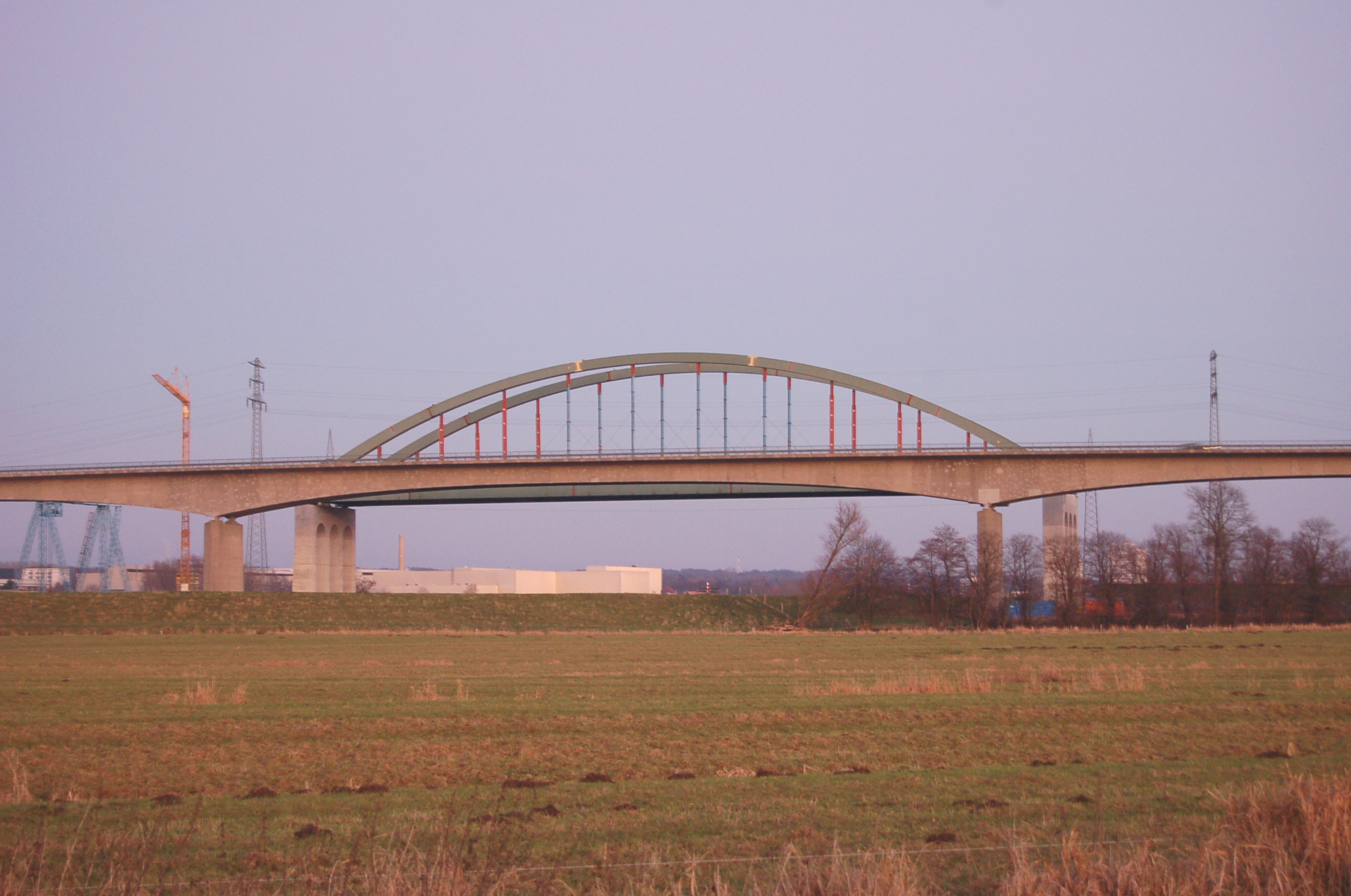 Die Störbrücke im Verlauf der A23 am 04.01.2009. Im Vordergrund die "alte" Störbücke im Hintergrund die Pfeiler und der Bogen der "neuen" Brücke.